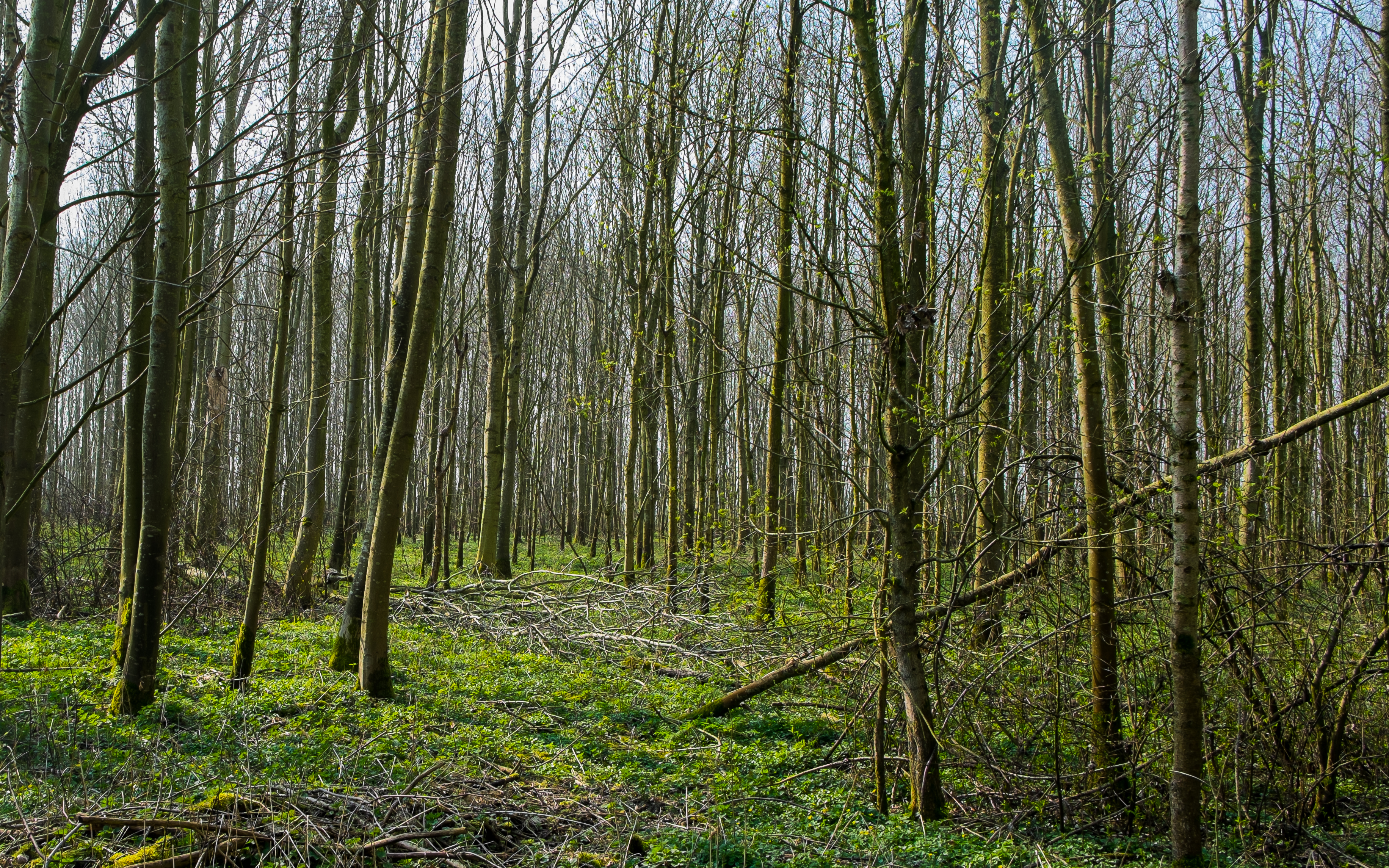 Bos Leenstertillen